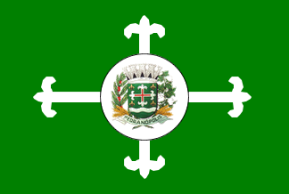 Bandeira de Pedranópolis - SP - Brasil.